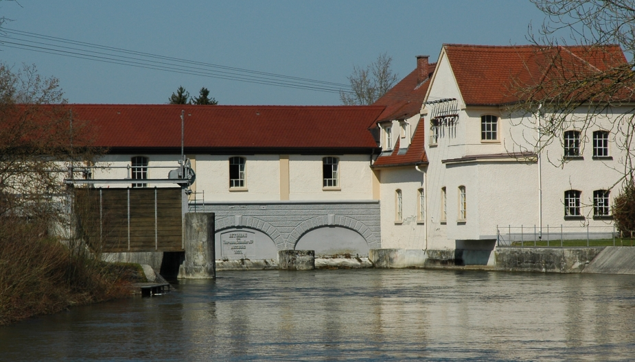 Das erste Elektrizitätswerk Bayerns